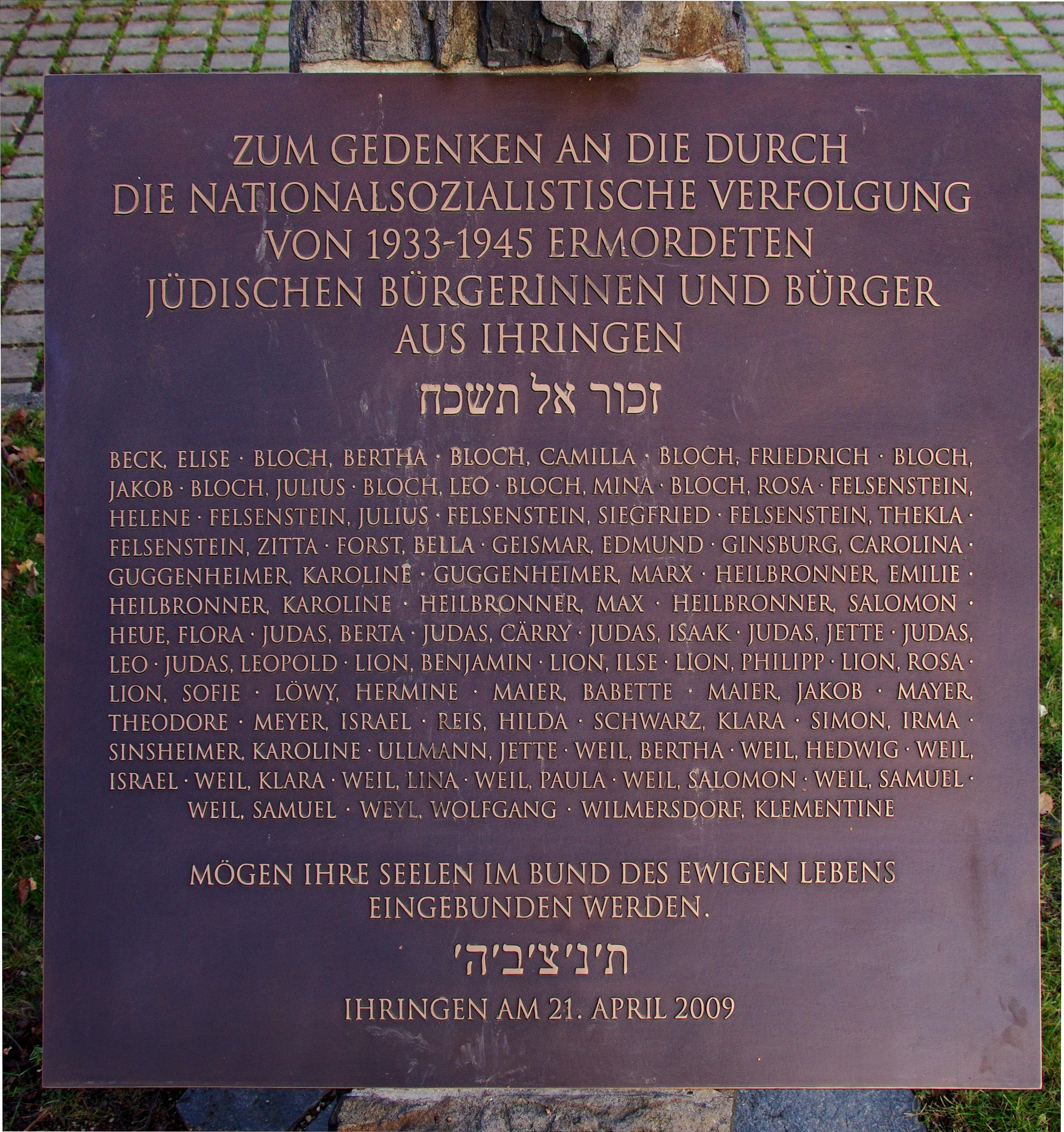 Die Inschrift auf der Gedanktafel für die durch die Nazis ermordeten Juden in Ihringen